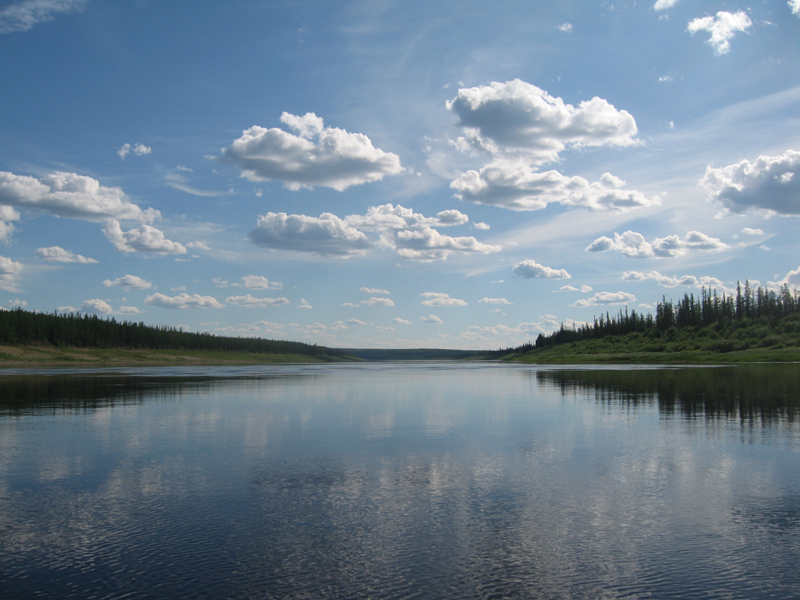 река Марха, левый приток реки Вилюй